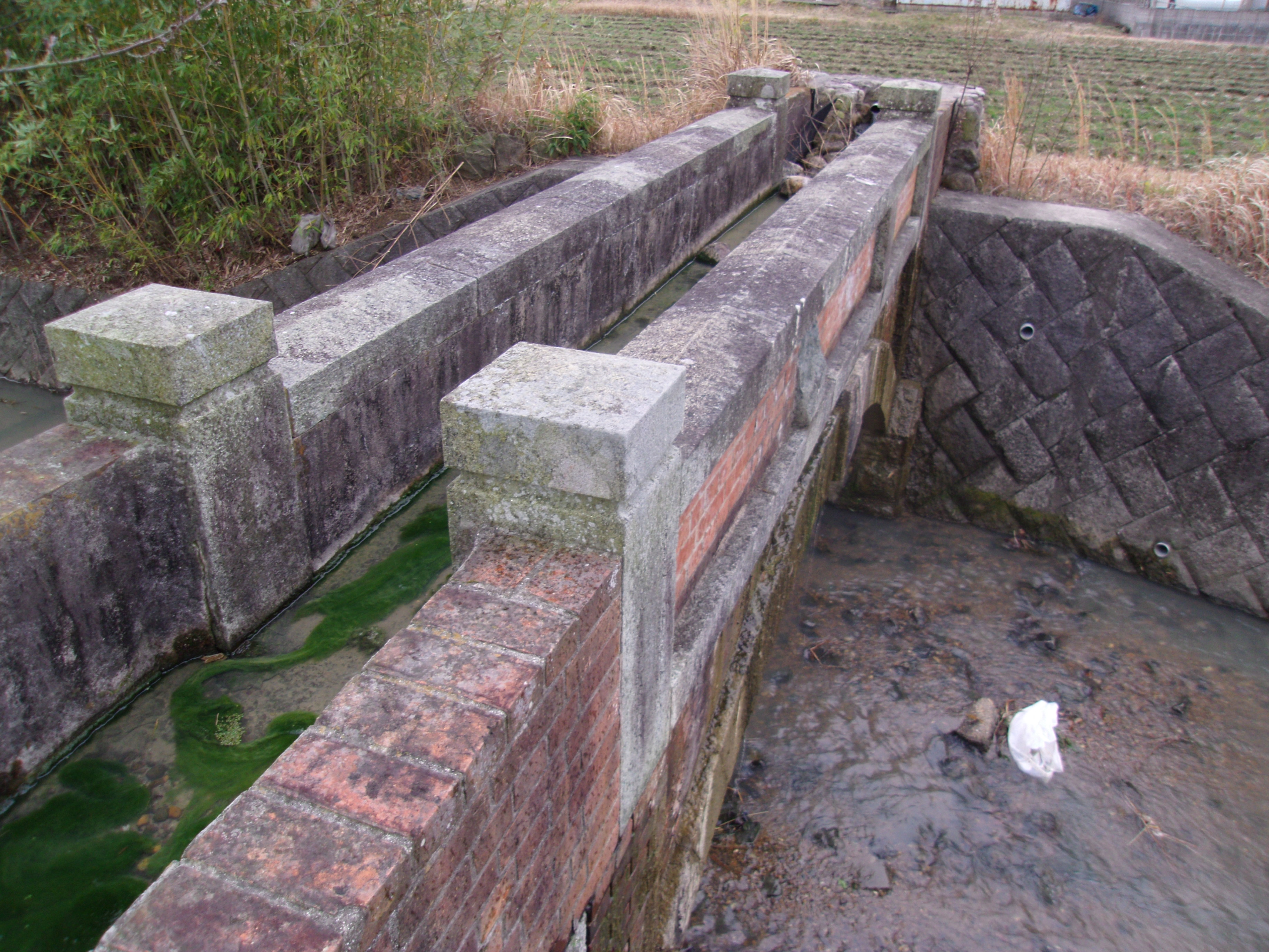 淡河疎水－手中支線に架けられレンガ造り水路の掌中橋、立体交差した水は中場池へ注いでいた